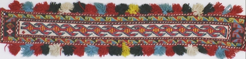 Taxtüstü — çarpayının (əsasəndə taxta çarpayıların) üzərinə örtülən örtük.